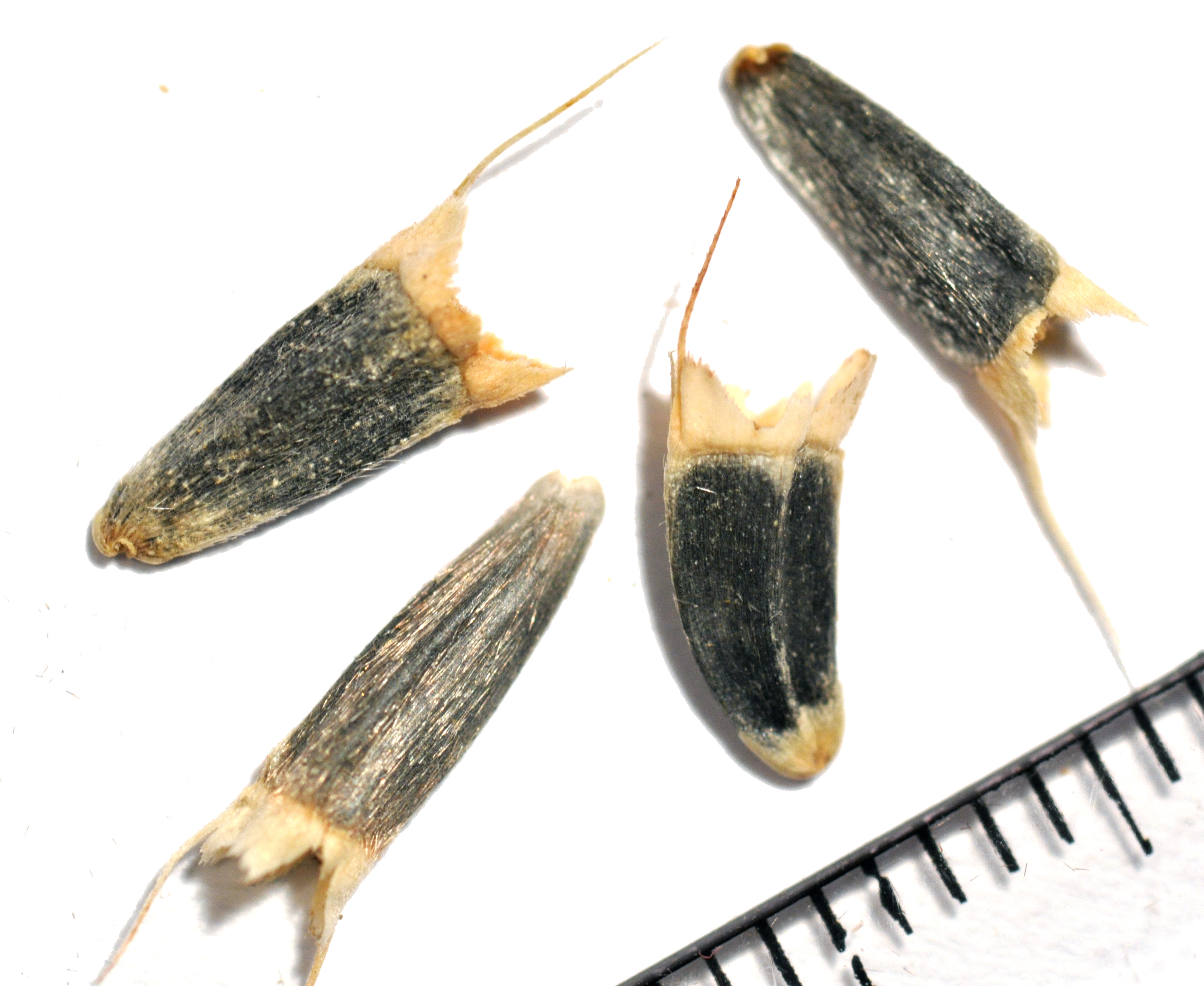 Samen der Tithonia rotundifolia. Heisst fälschlicherweise auch Mexianischen Sonnenblume.